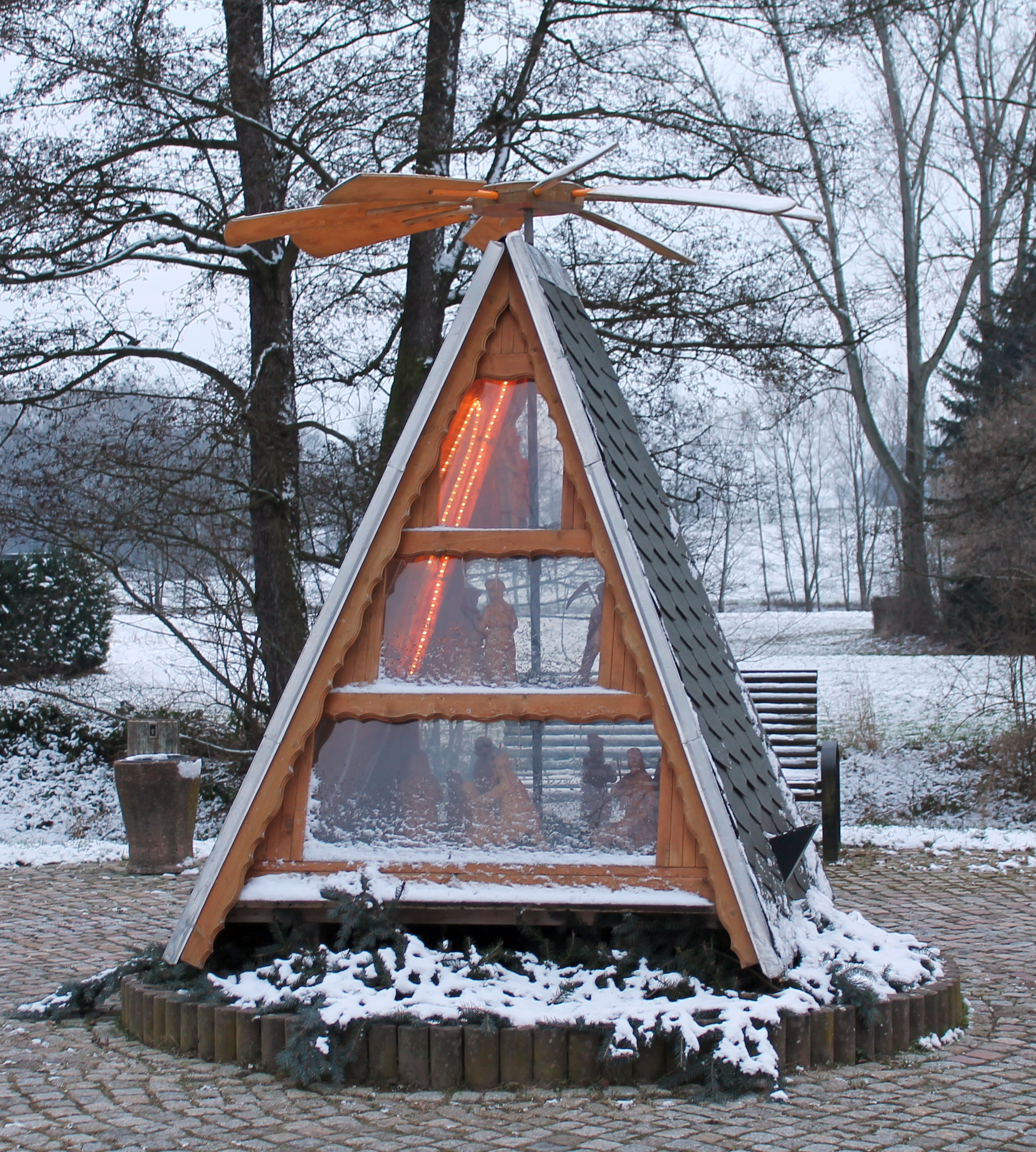 Ortspyramide des Bernsdorfer Ortsteils Hermsdorf